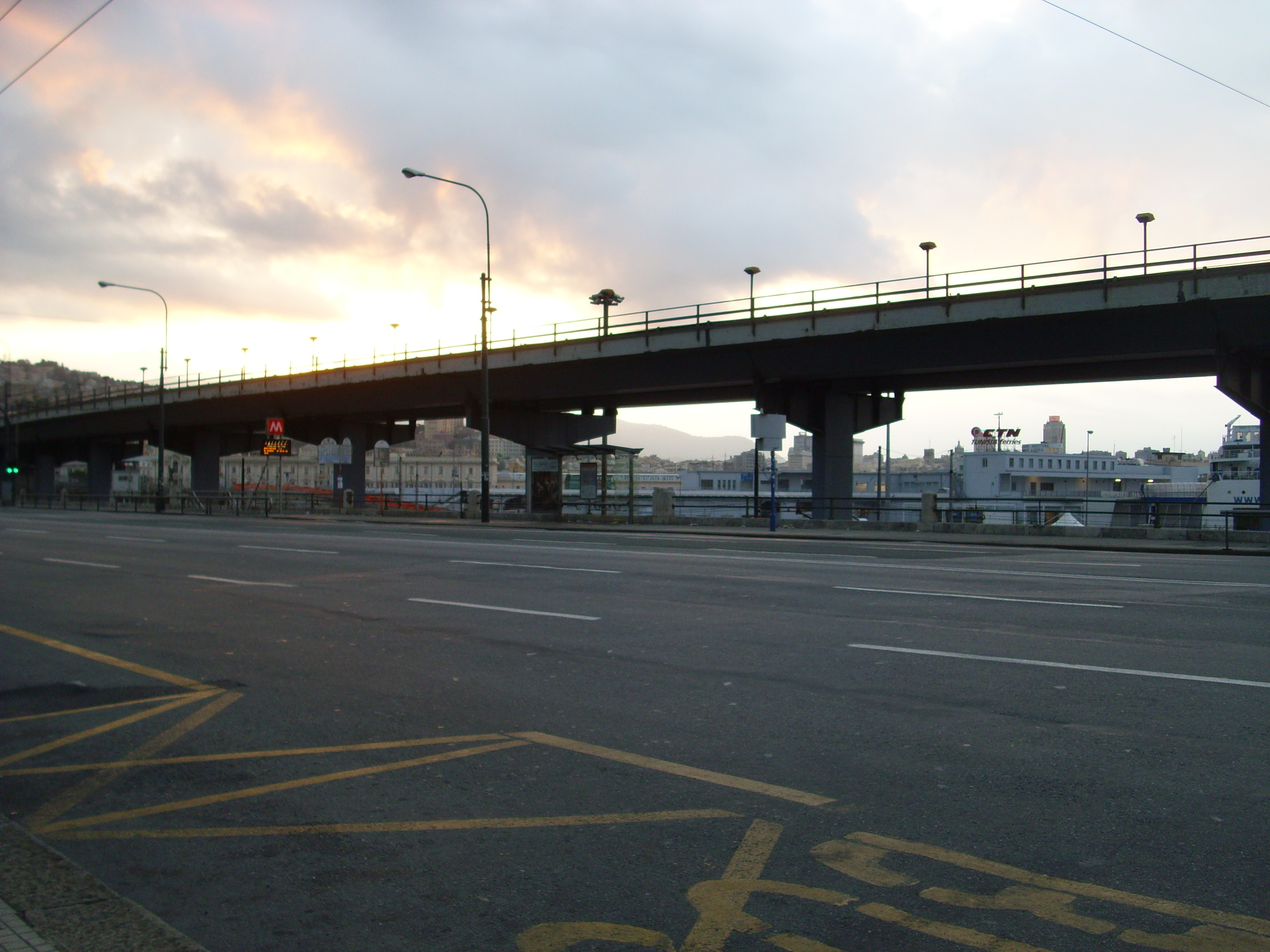 La sopraelevata di Genova vista da via Bruno Buozzi